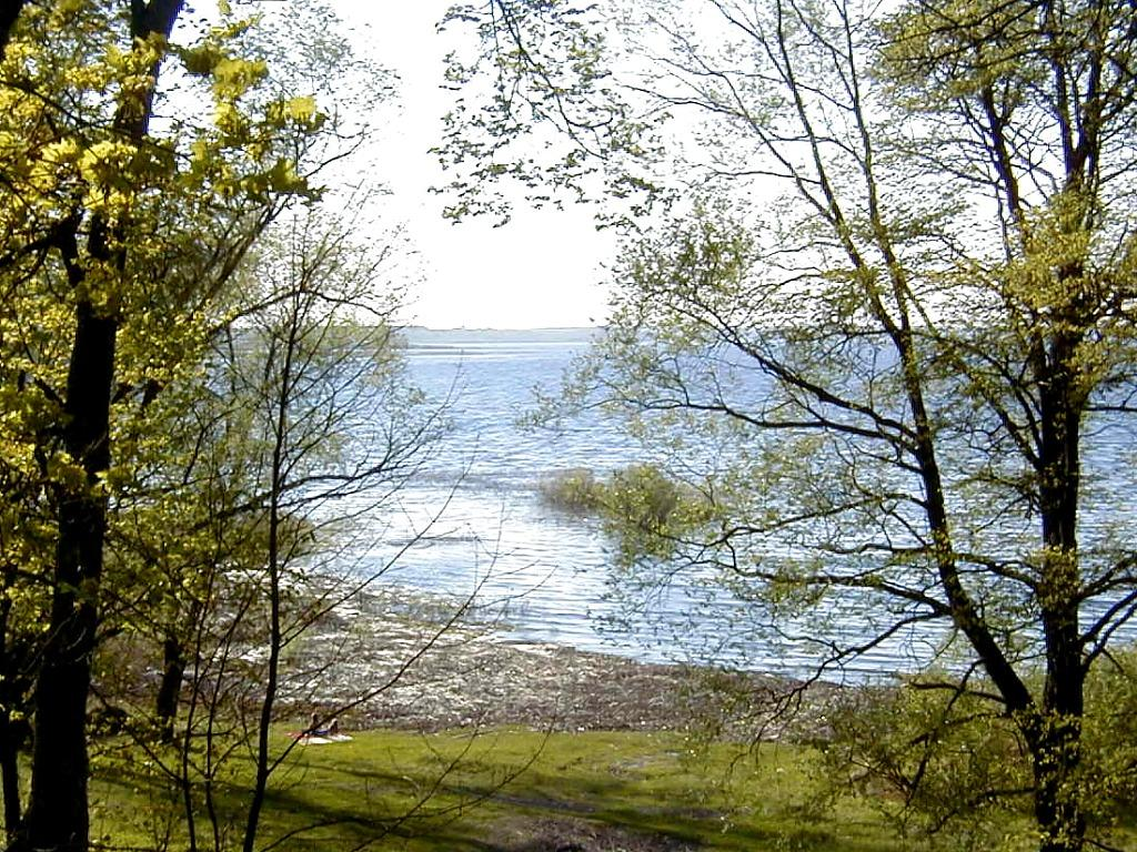 Le lac de Burtnieki, à proximité du village de Burtnieki